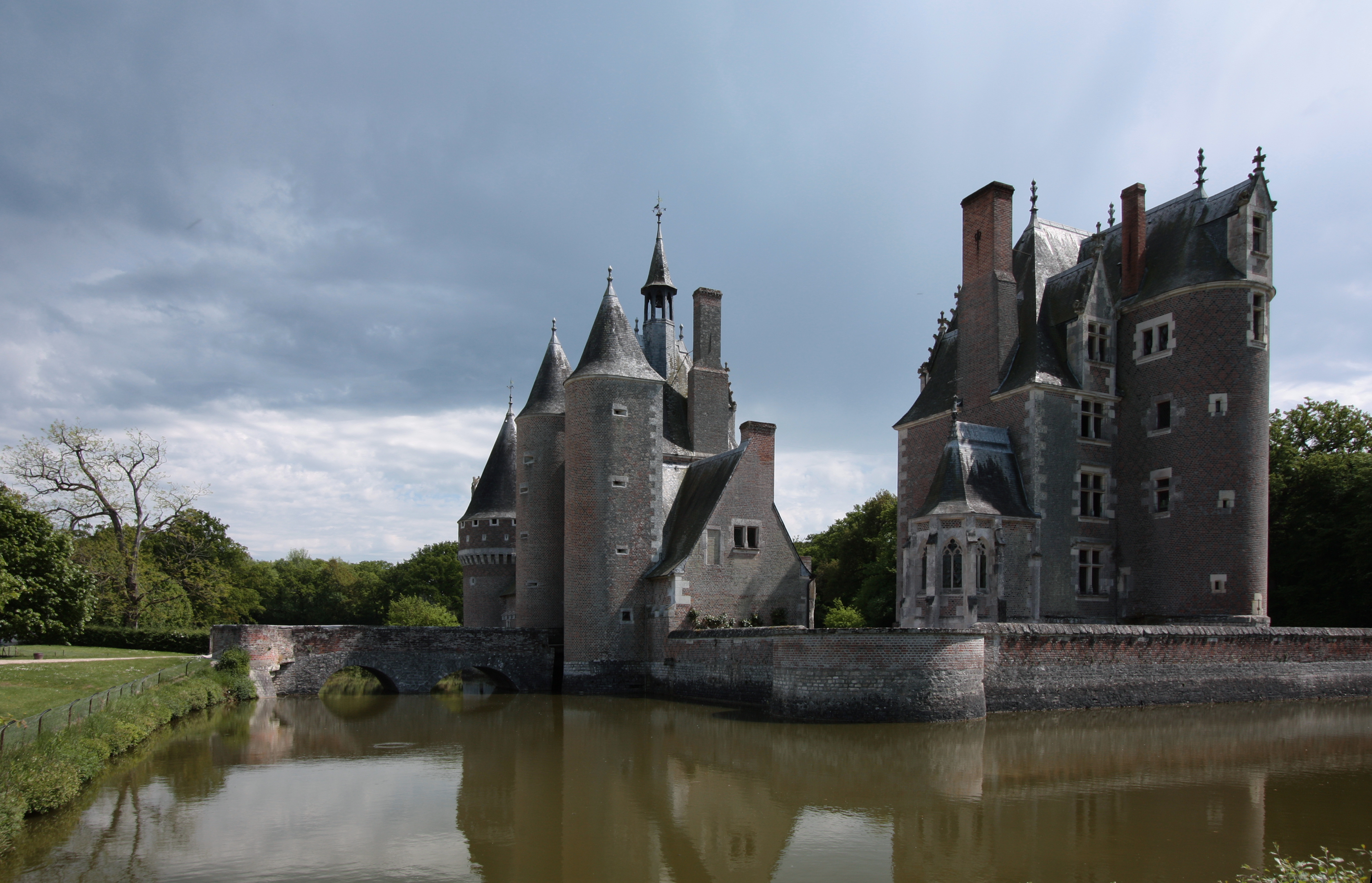 Schloss Le Moulin in der Kommune Lassay-sur-Croisne im Departement Loir-et-Cher/Frankreich - Westseite.